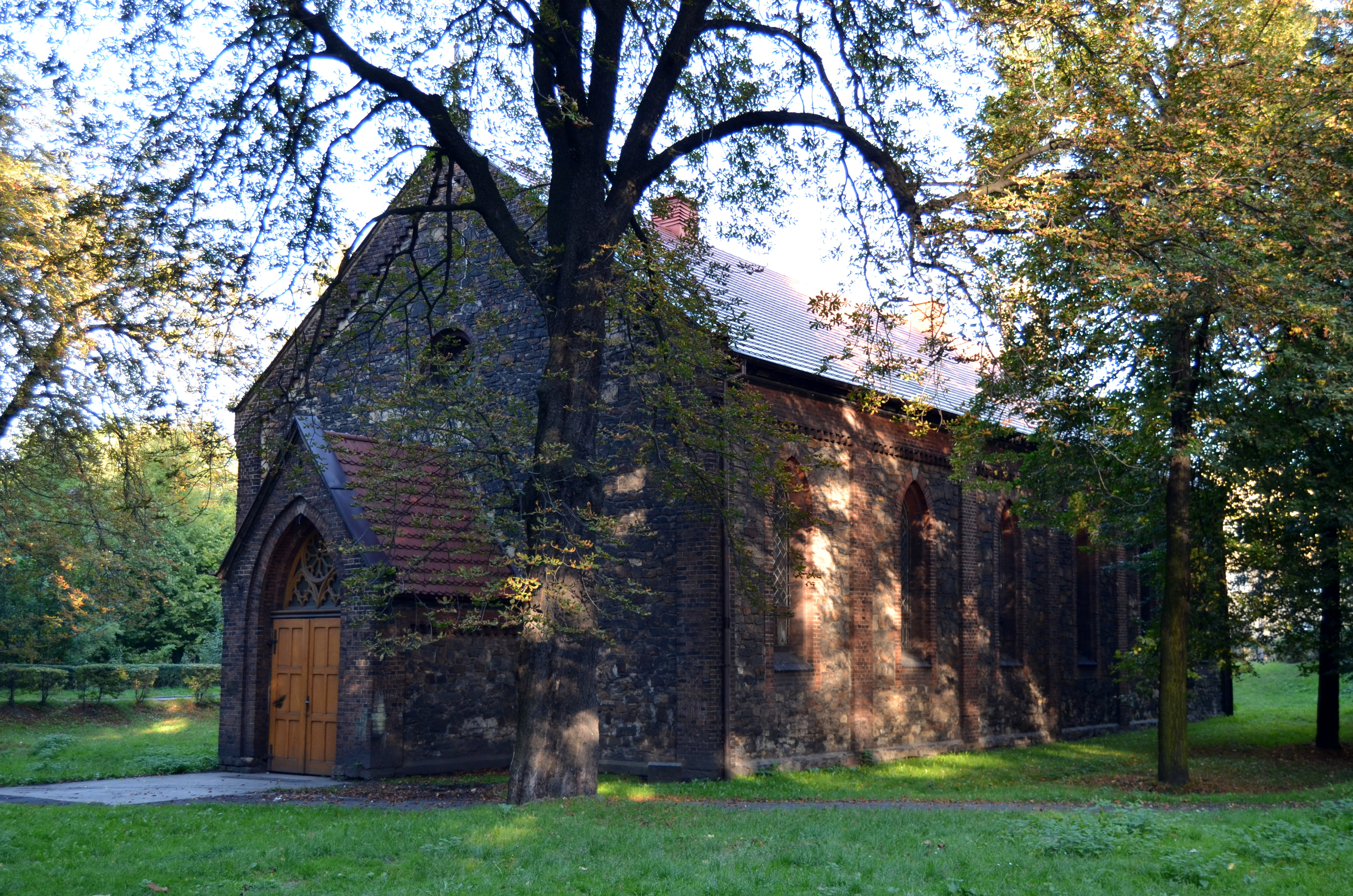 Ruda Śląska, kaplica pw. św. Józefa, obecnie św. Piusa X, 1870